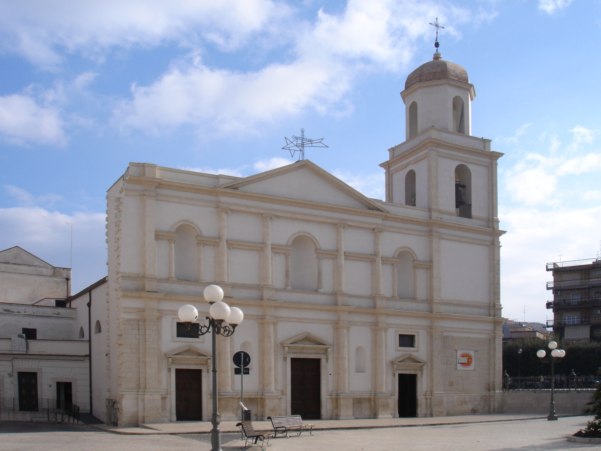 Facciata della cattedrale di Canosa